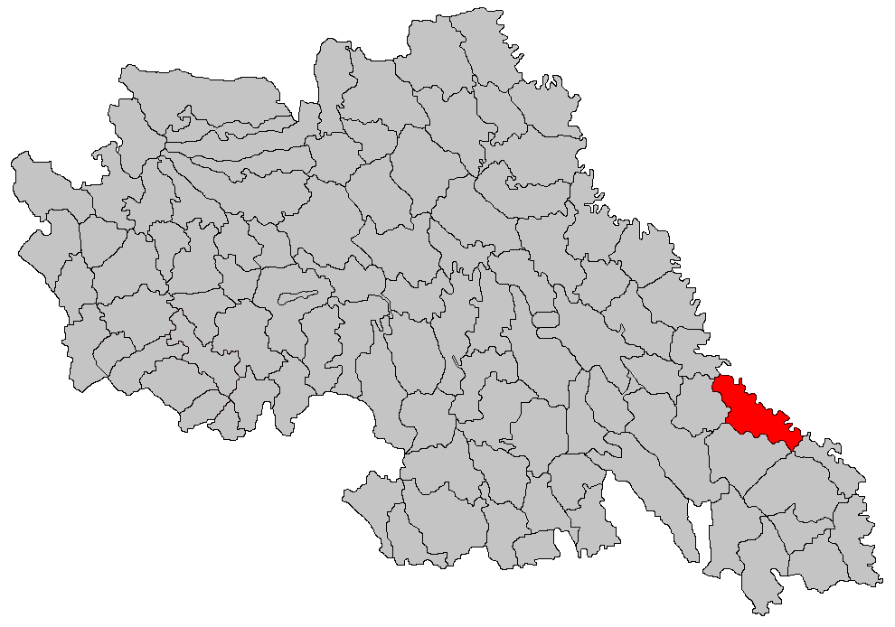 Categorie:Hărţi ale judeţului Iaşi